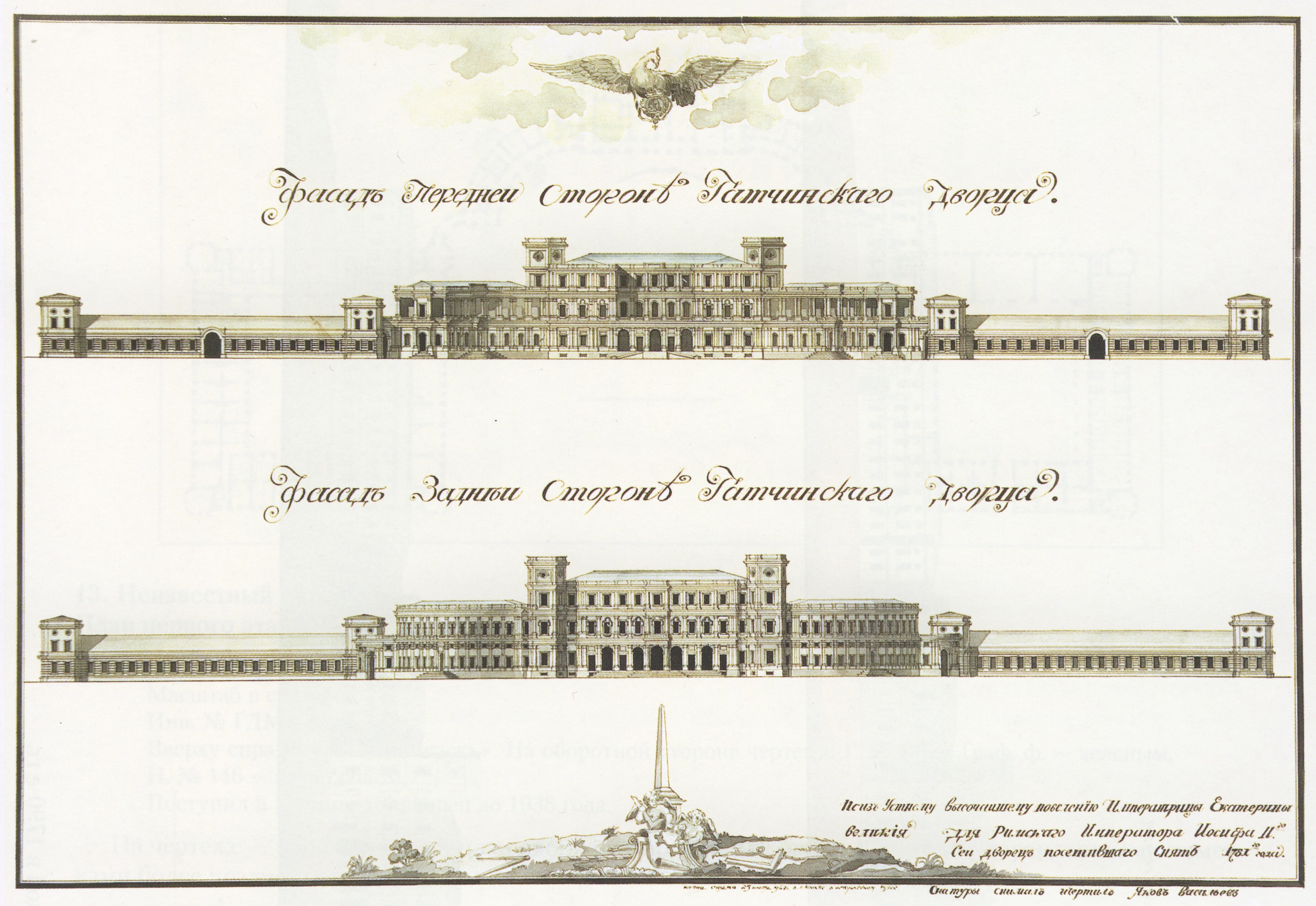 Большой Гатчинский дворец. Фасады. Копия 1947 года с чертежа 1781 года